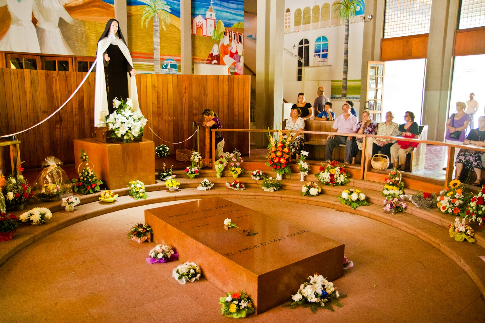 Santuario Auco-006